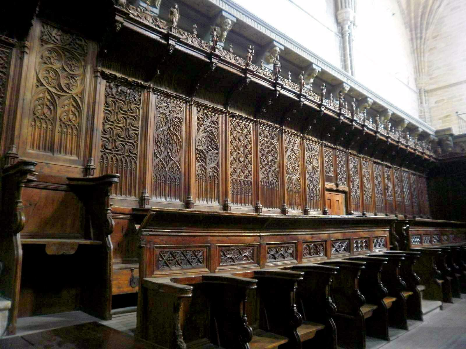 Catedral de la Asunción de de Coria (provincia de Cáceres). SIllería del coro